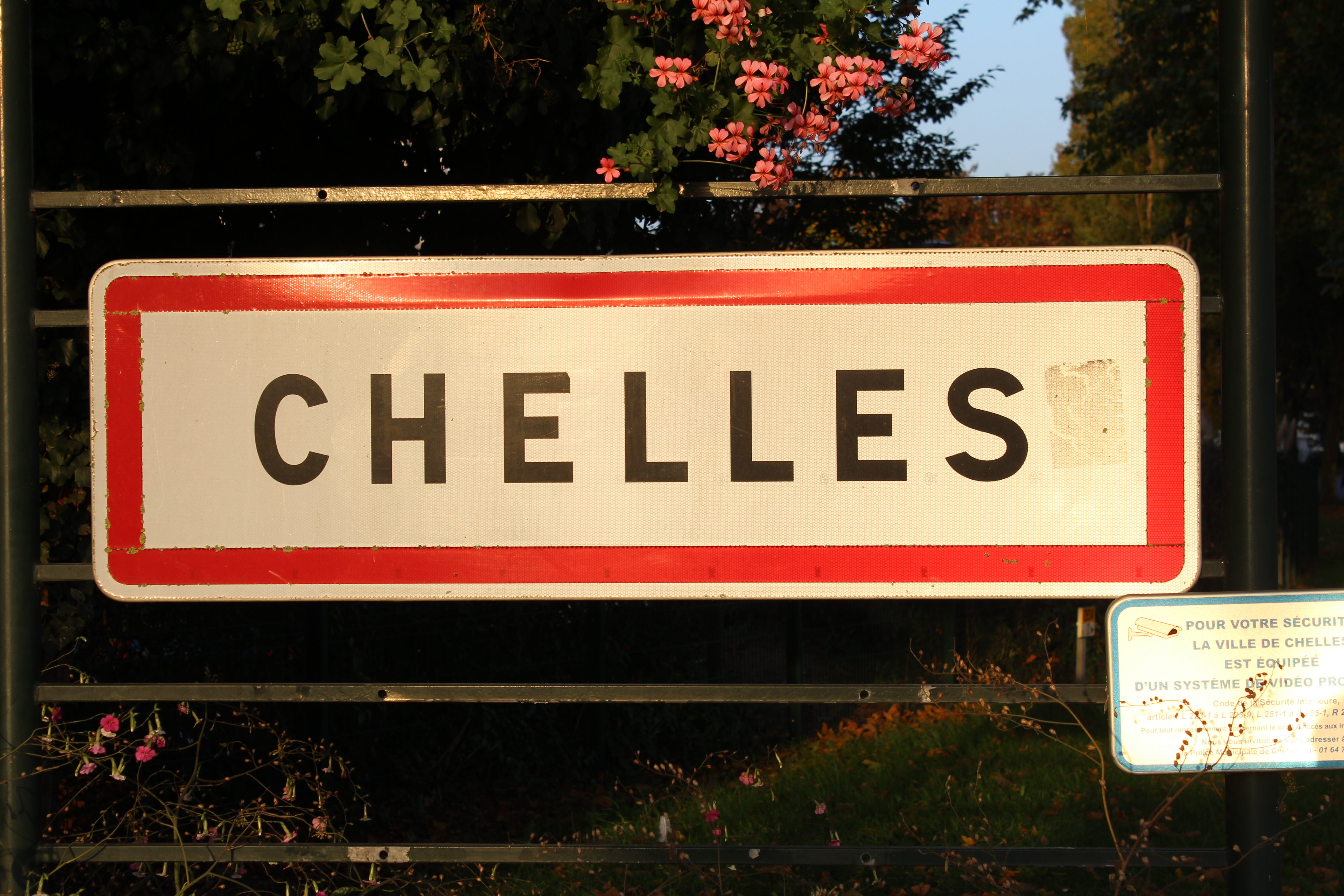 Panneau d'entrée dans Chelles, Seine-et-Marne.